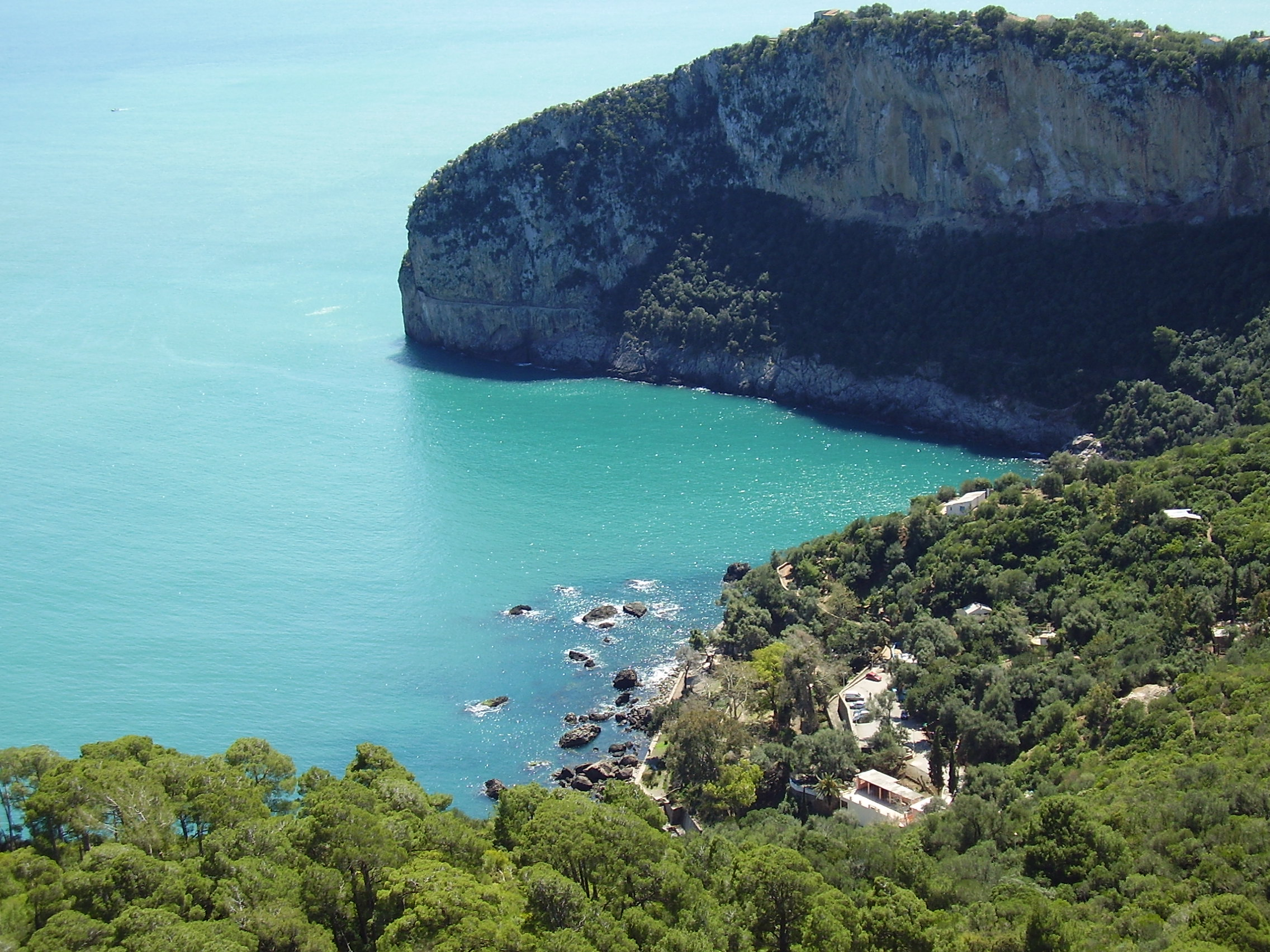 Les Aiguades, near Béjaïa, Algeria